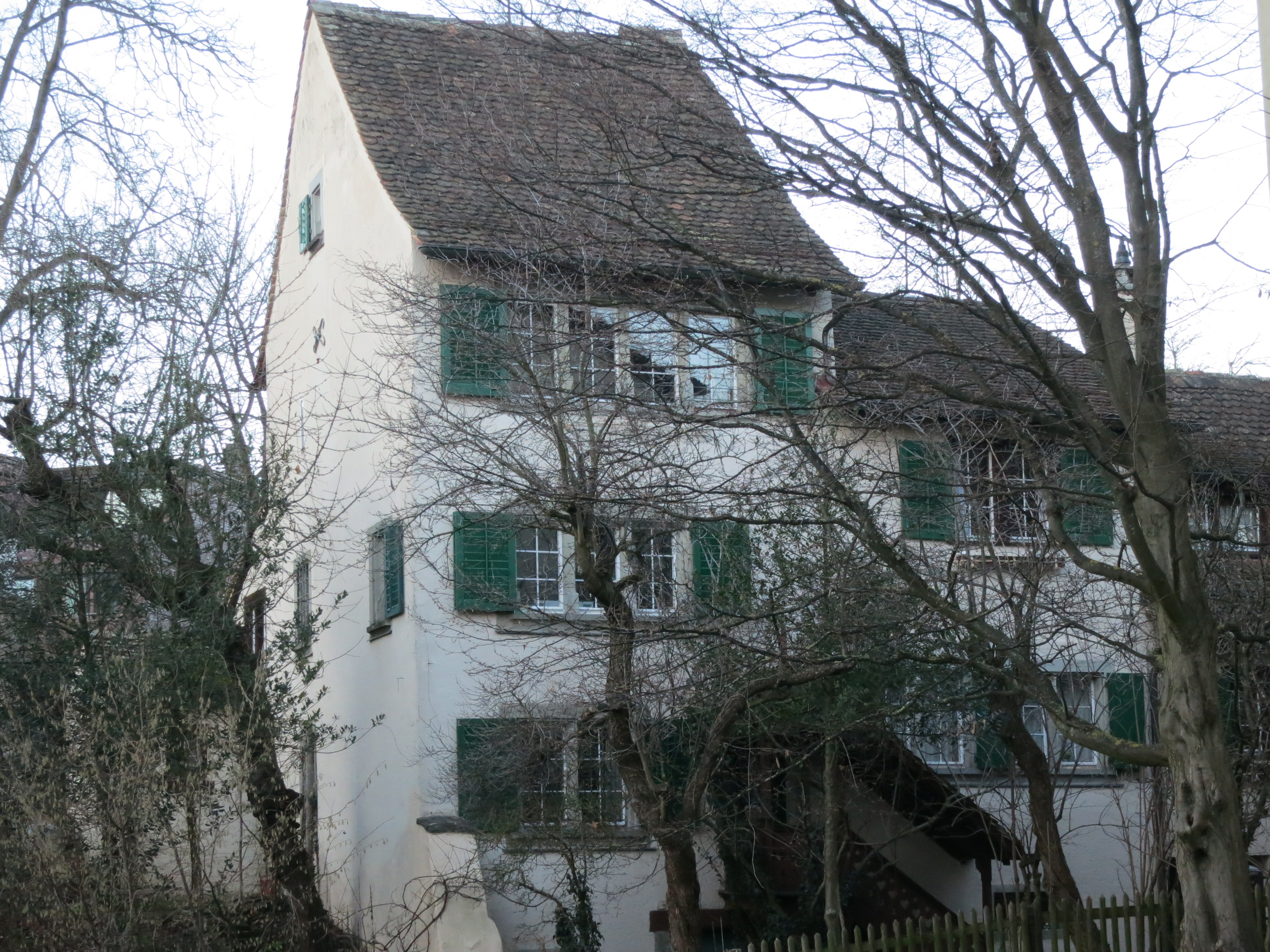 Wohnhaus, Zürich-Enge, Schweiz